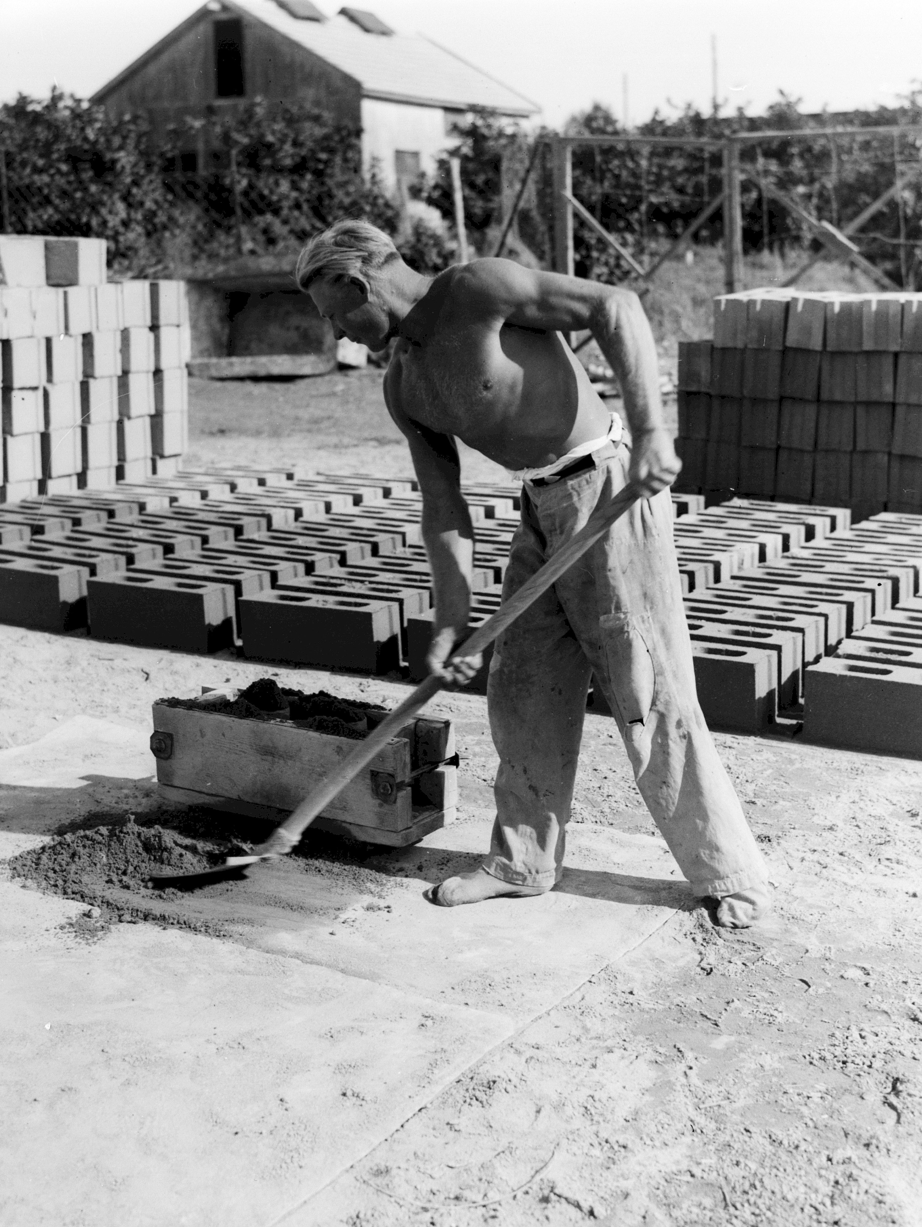 A Russian convert to Judaism, building a farm for his family at Nahalat Yitzhak Tel Aviv. עולה מברית המועצות שהמיר את דתו ליהדות, בונה חווה למשפחתו בנחלת יצחק בתל אביב